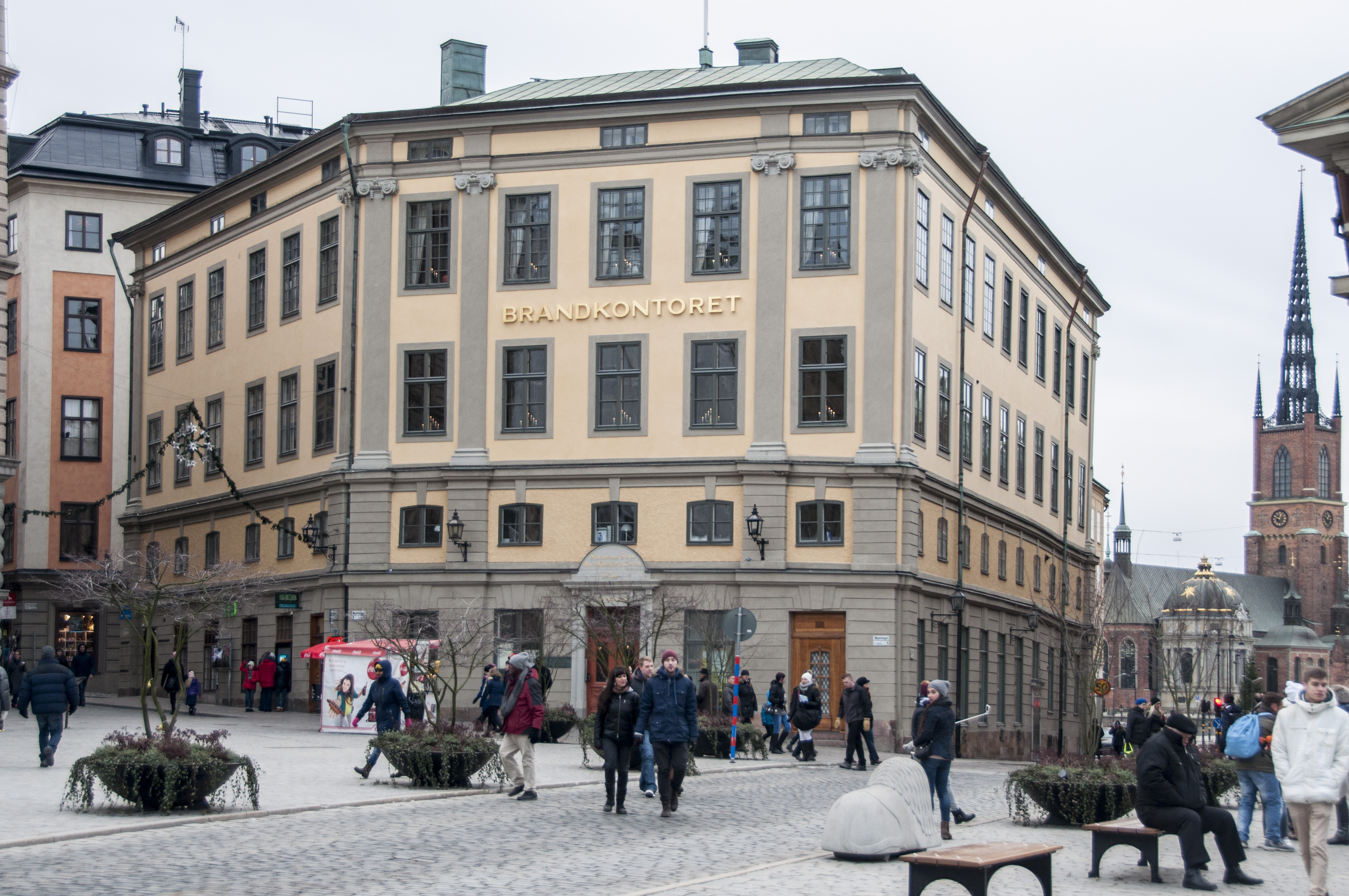 Brandkontoret